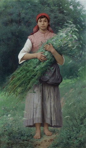 Jeune paysanne de la vallée de l'Andorno (Piémont). Envoi du peintre Gamba de Preydour au Salon de 1889.